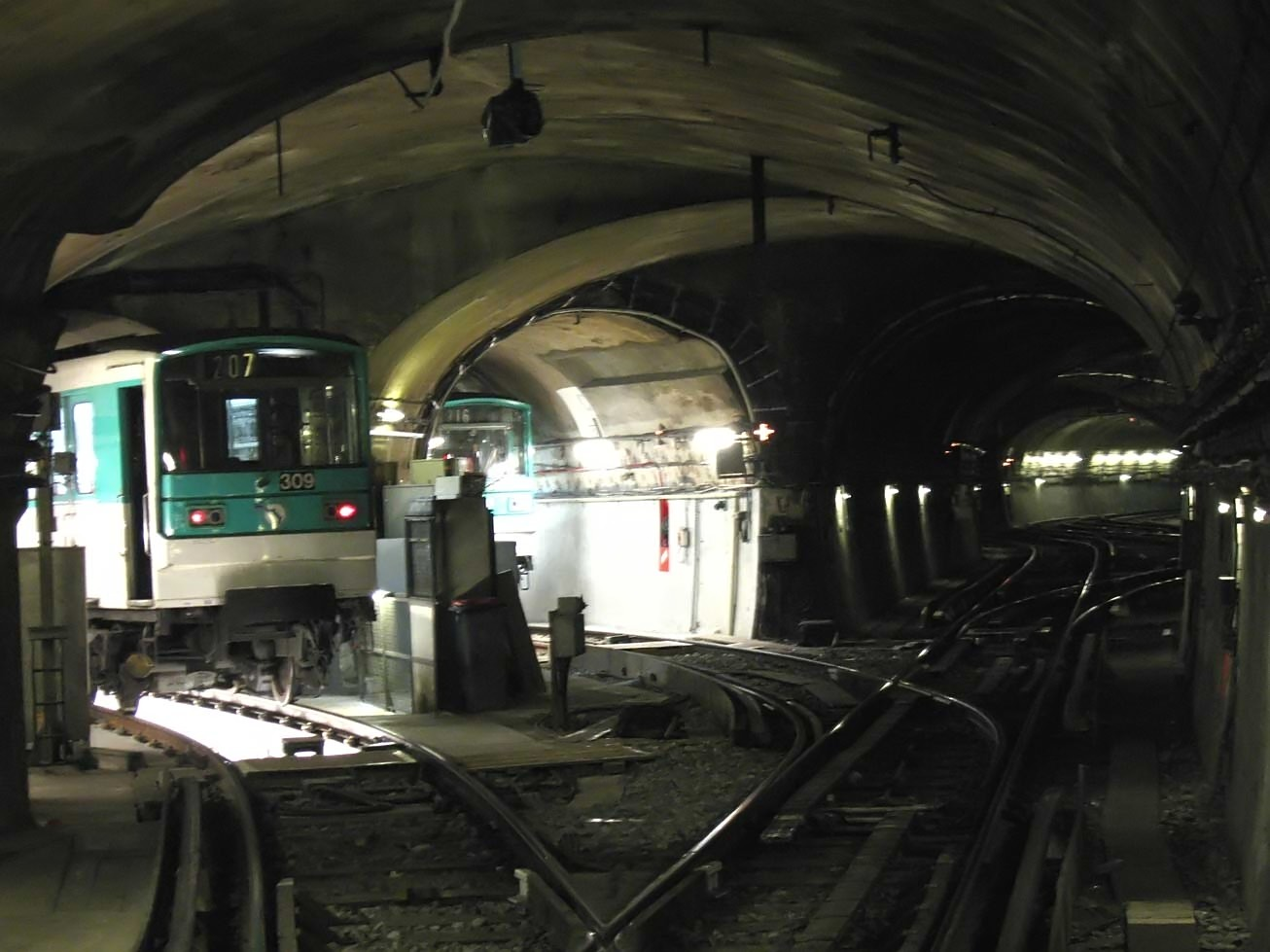 Métro de Paris, Voies de garage, Station Nation (ligne 2), Paris, France